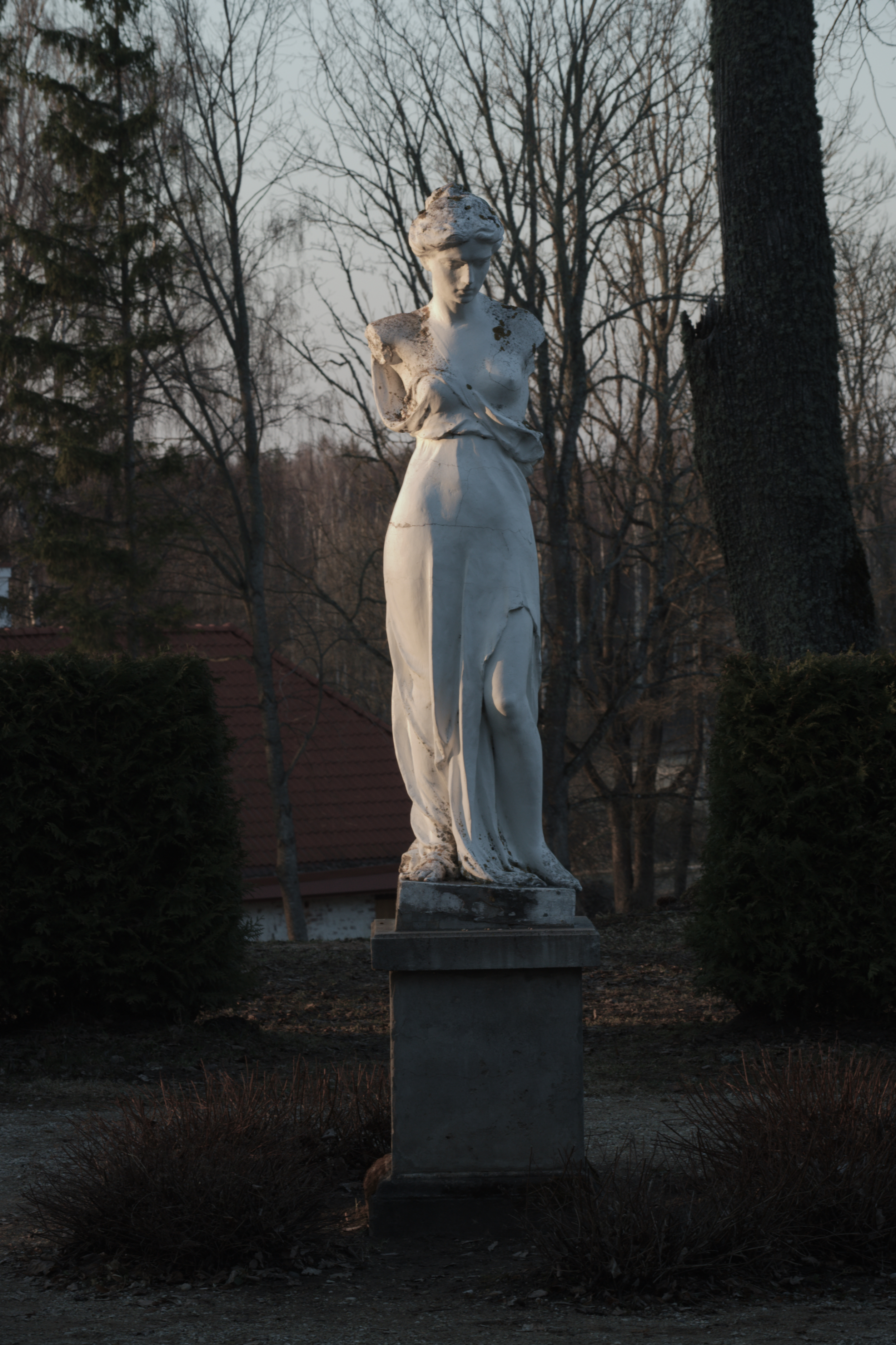 Luke mõisa naise skulptuur 2018. aastal